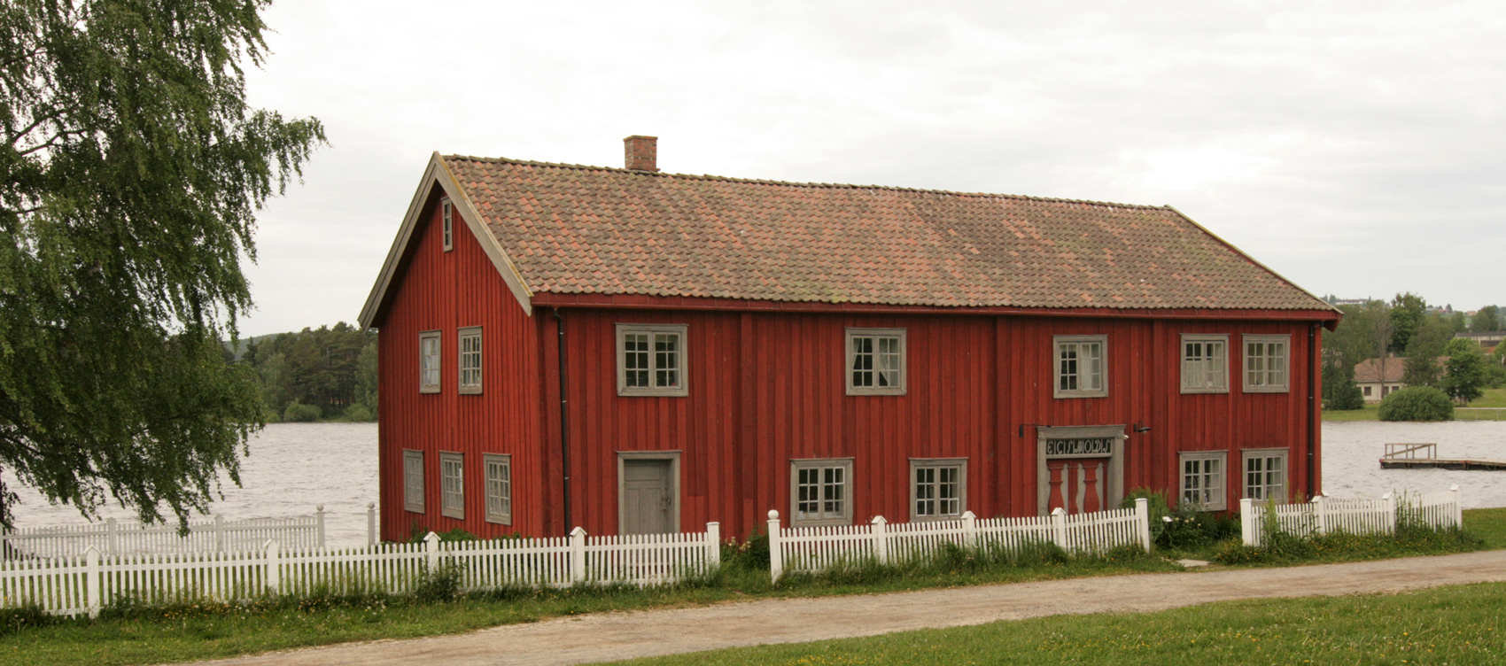 Forpakterbolig fra Løten prestegard. Oppført 1706. I dag på Hedmarksmuseet, Hamar.